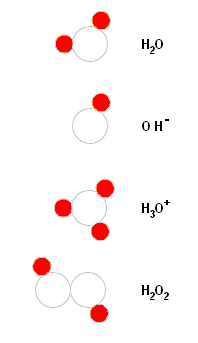 H-Oxide